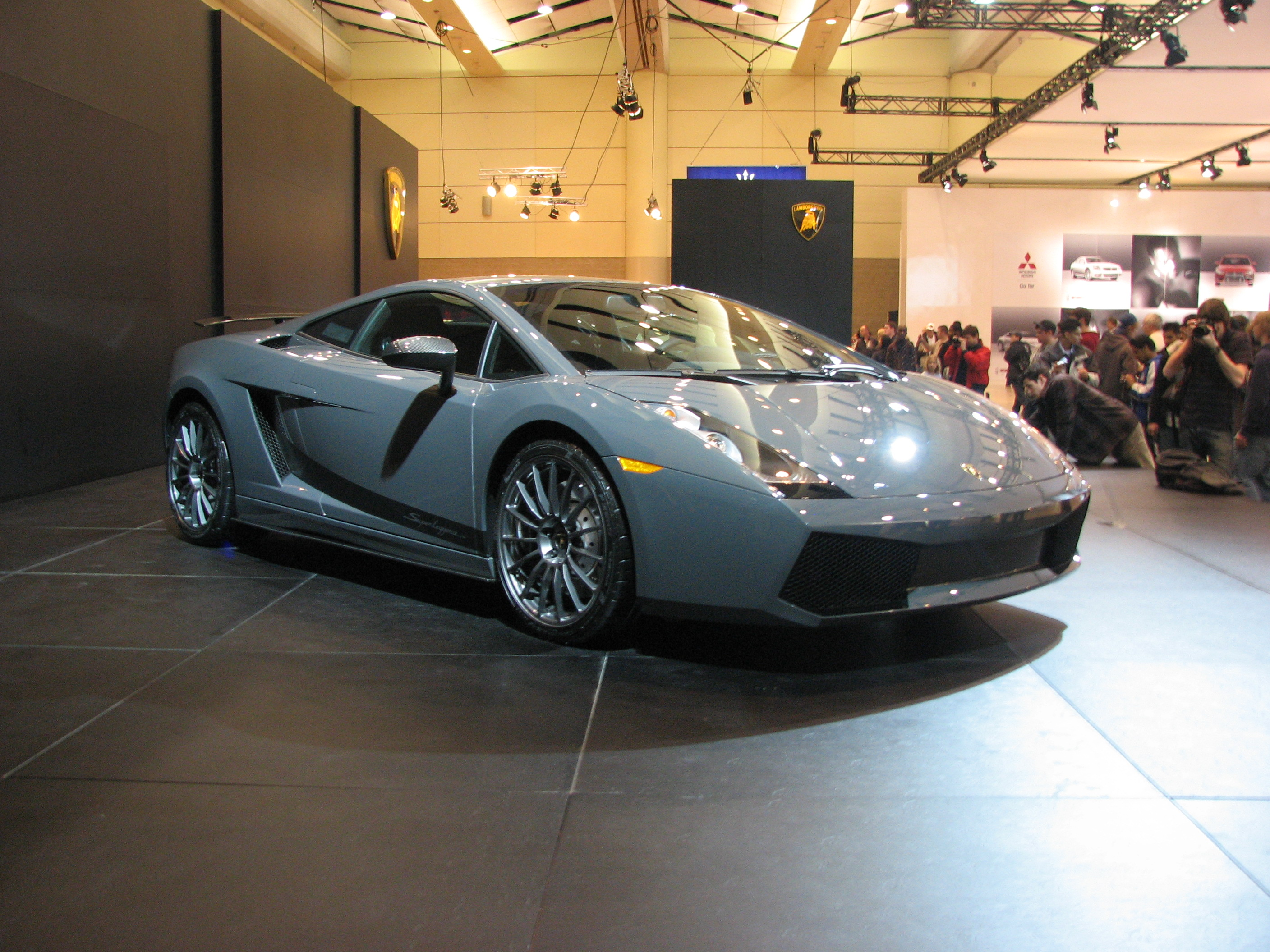 Lamborghini Gallardo Superleggera at toronto auto show